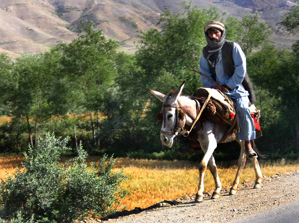 Man on donkey, Afghanistan